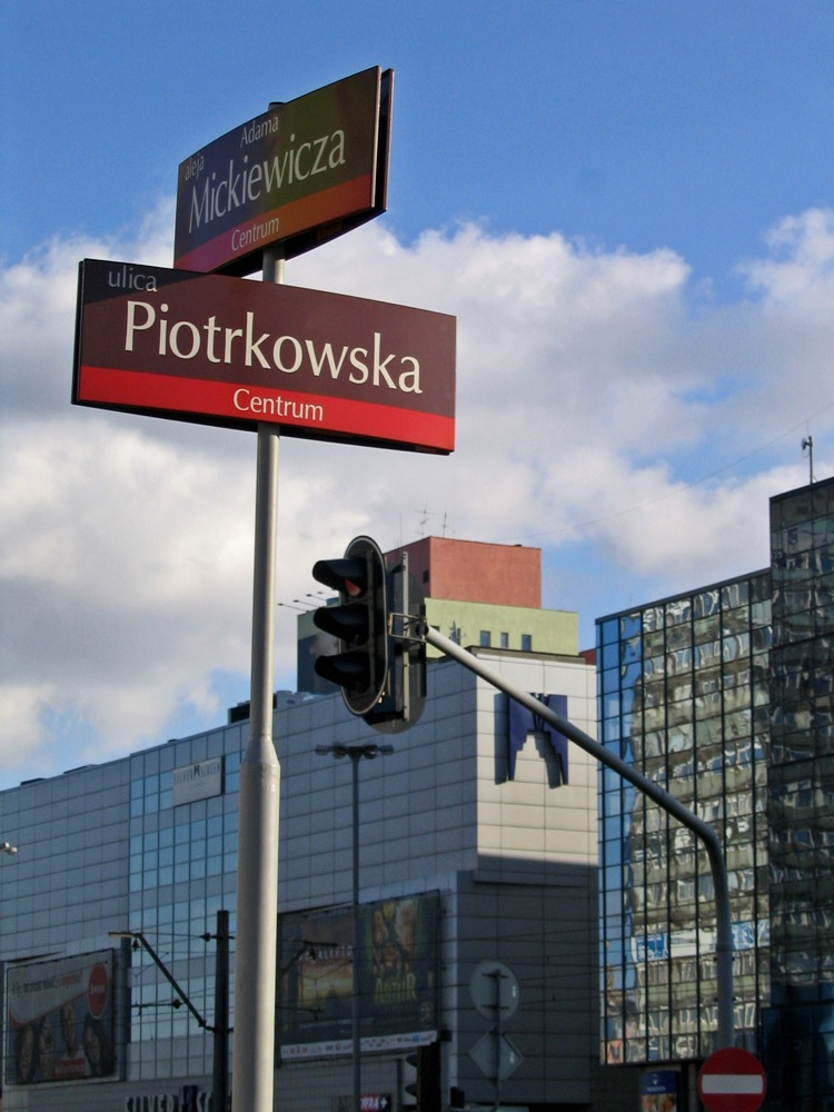 Tabliczki SIM w Łodzi